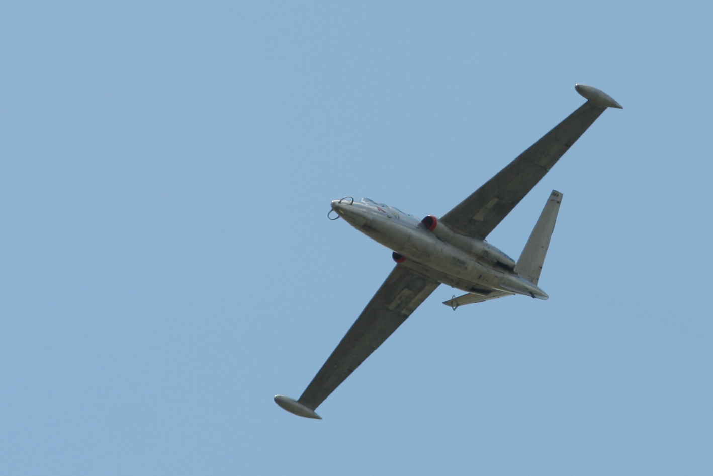 Photo d'un Fouga lors du meeting de la BA102 en 2008